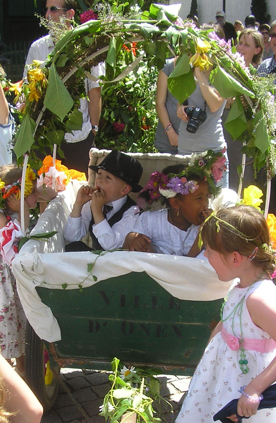 Cortège du « Feuillu » dans le Vieil-Onex, commune d'Onex à Genève. Les « mariés » sont dans une charrette tirée par d'autres enfants (la charrette porte l'inscription « Ville d'Onex »). Réintroduction en 2011 de la tradition locale, perdue depuis la fin des années 1960.